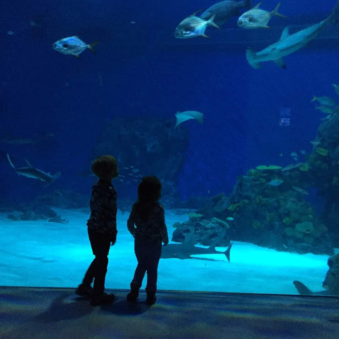 Српски (ћирилица): Akvarijum u Danskoj